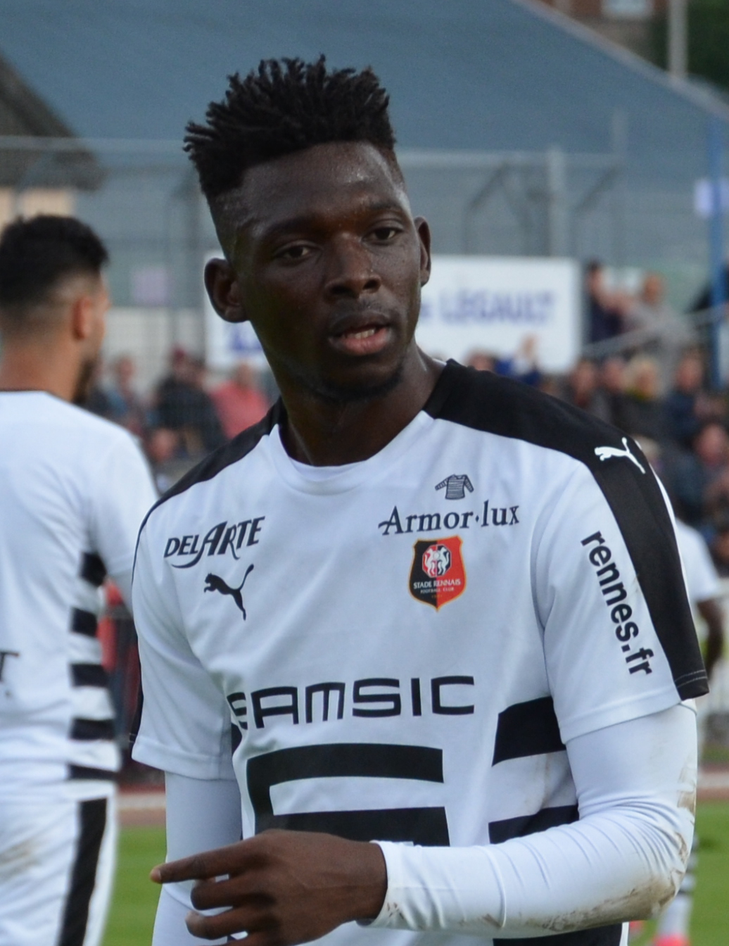 Photographie prise lors du match opposant le Stade rennais au SM Caen en match amical au stade Pierre-Compte de Vire le 22 juillet 2017. Ici, Hamari Traoré.